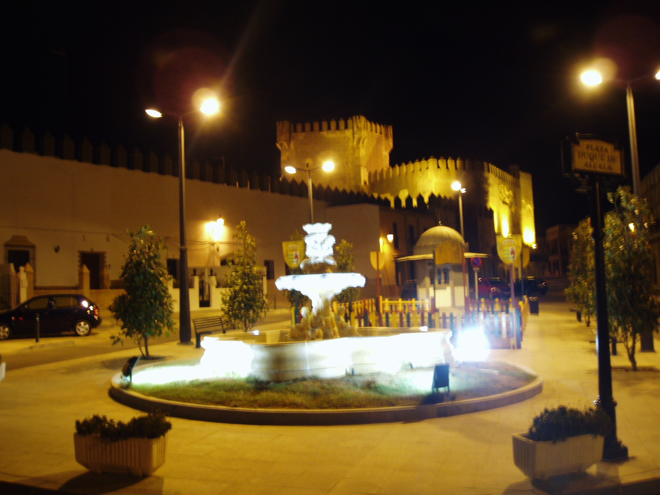 Los Molares por la noche